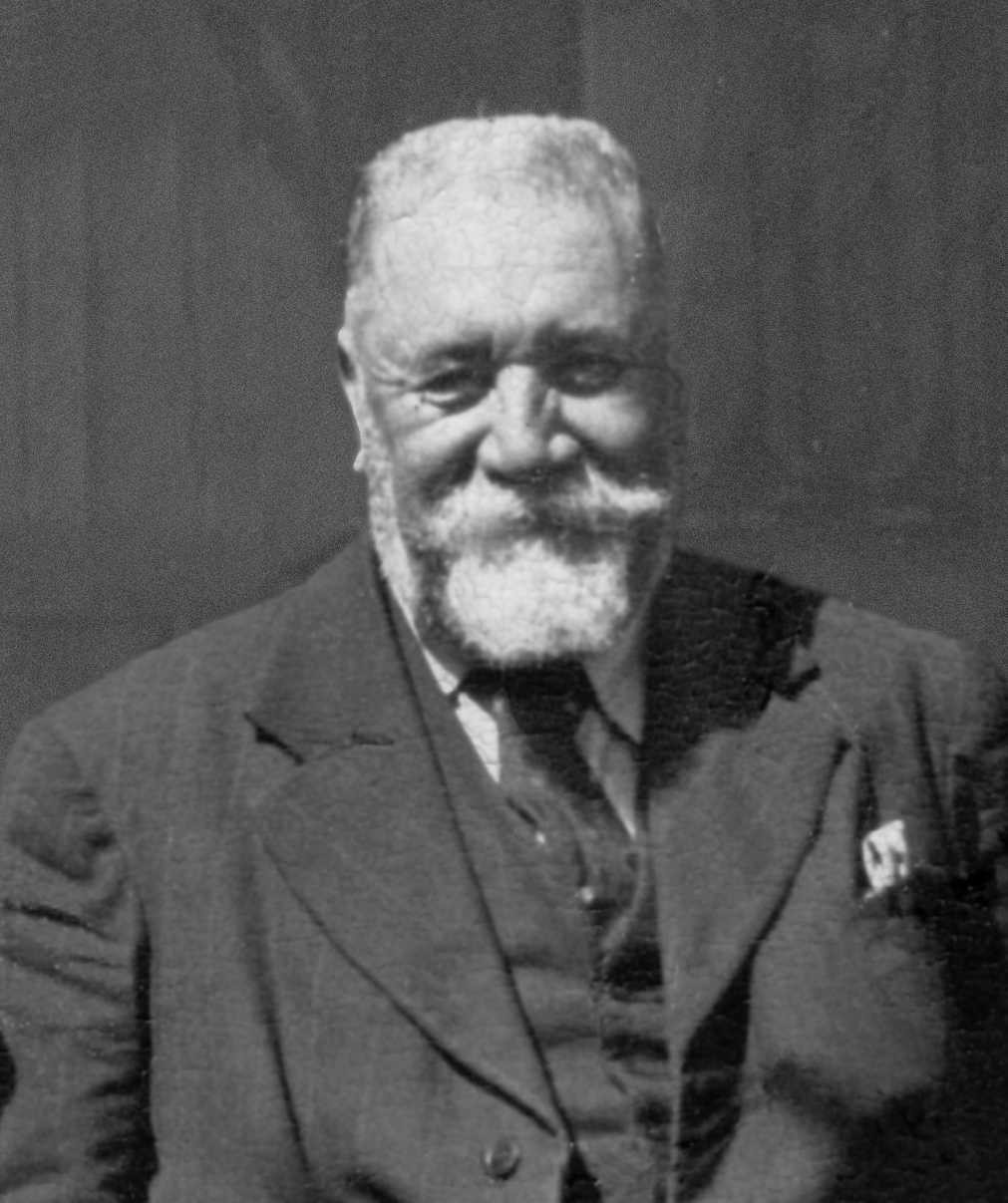 Tomás Burgos Sotomayor, founder of Villa Lo Burgos-Purranque